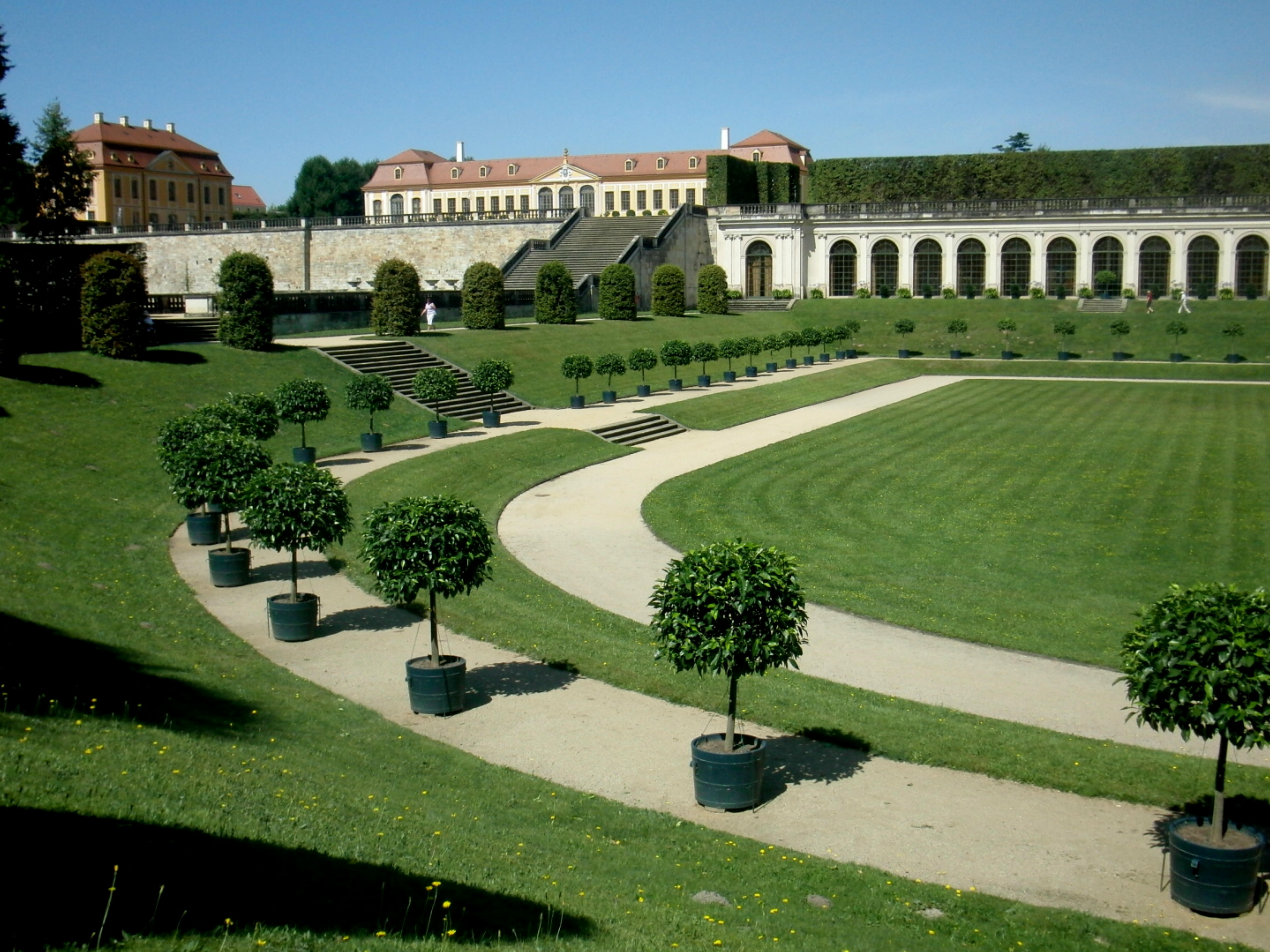 Barockgarten Großsedlitz